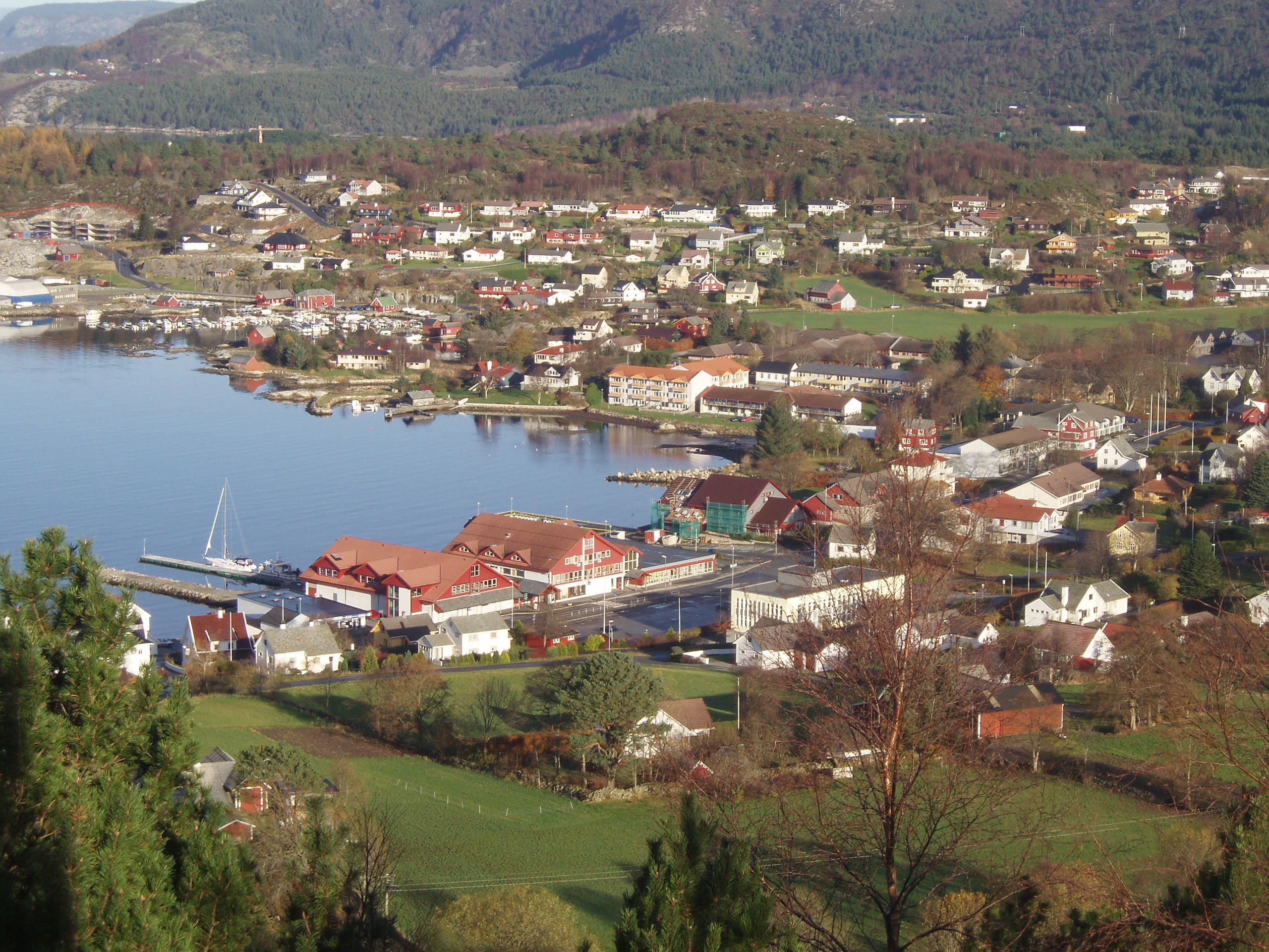 Fitjar sentrum sett frå Storhaugen. Center of Fitjar seen from Storhaugen.